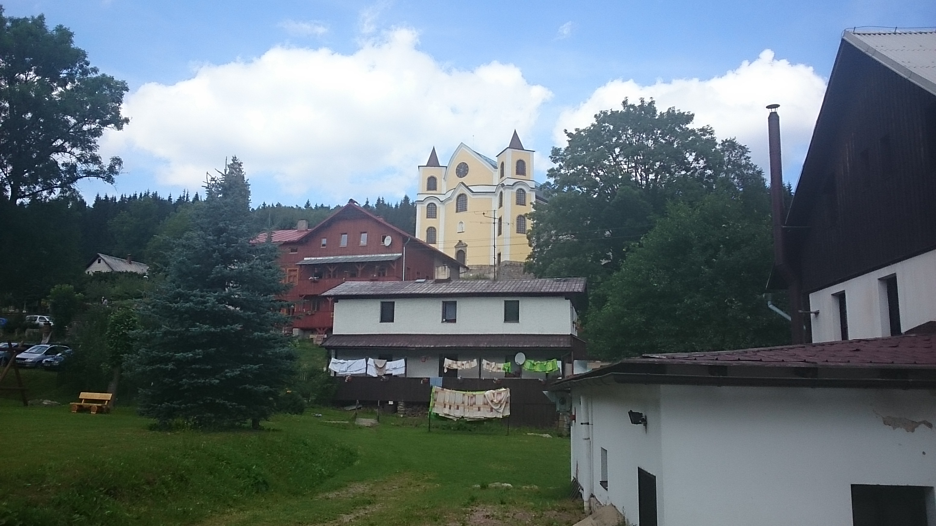 Friedhof mit Kapelle der Kirche